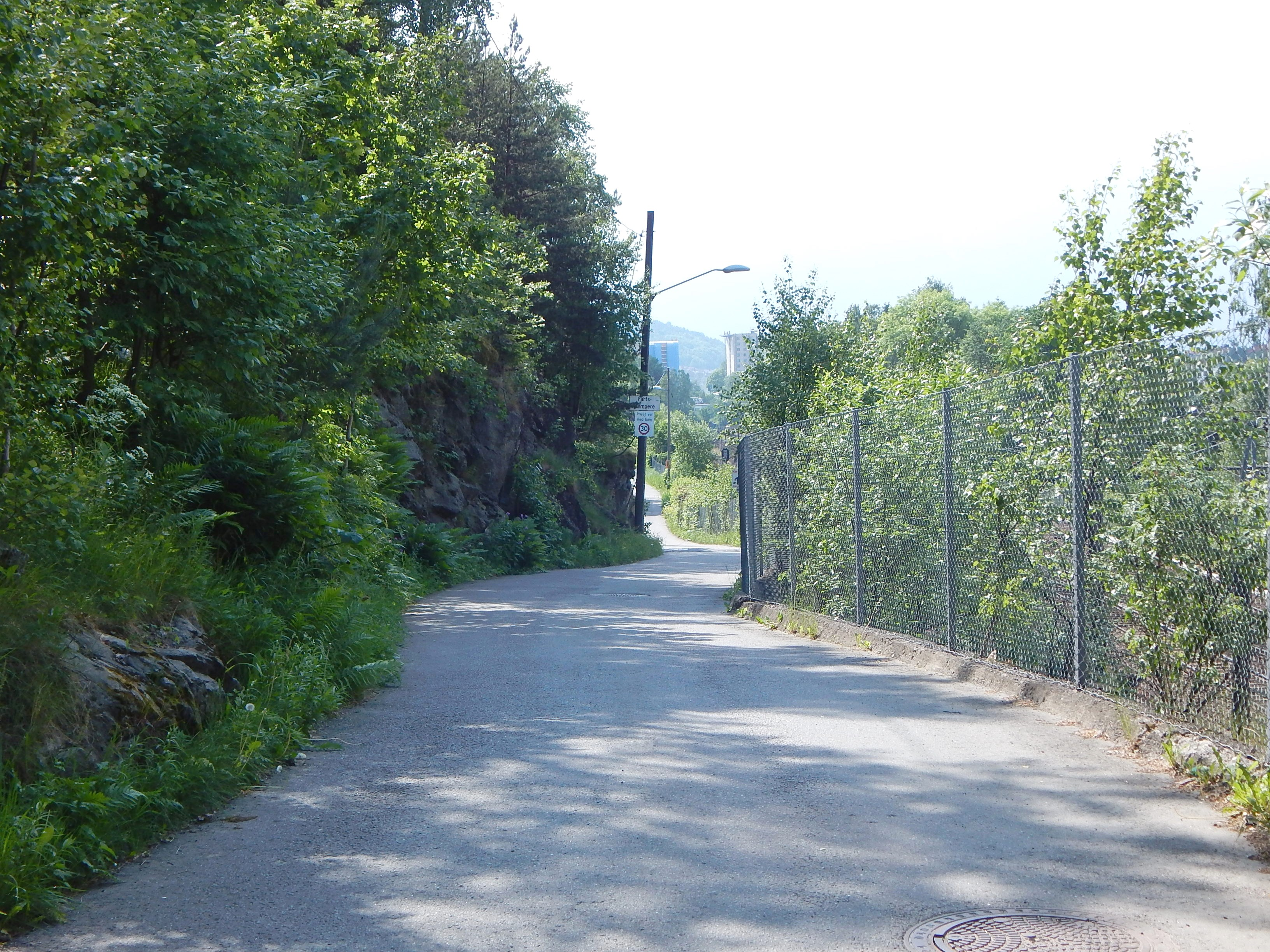 Fagerlia sett fra Bryn-siden